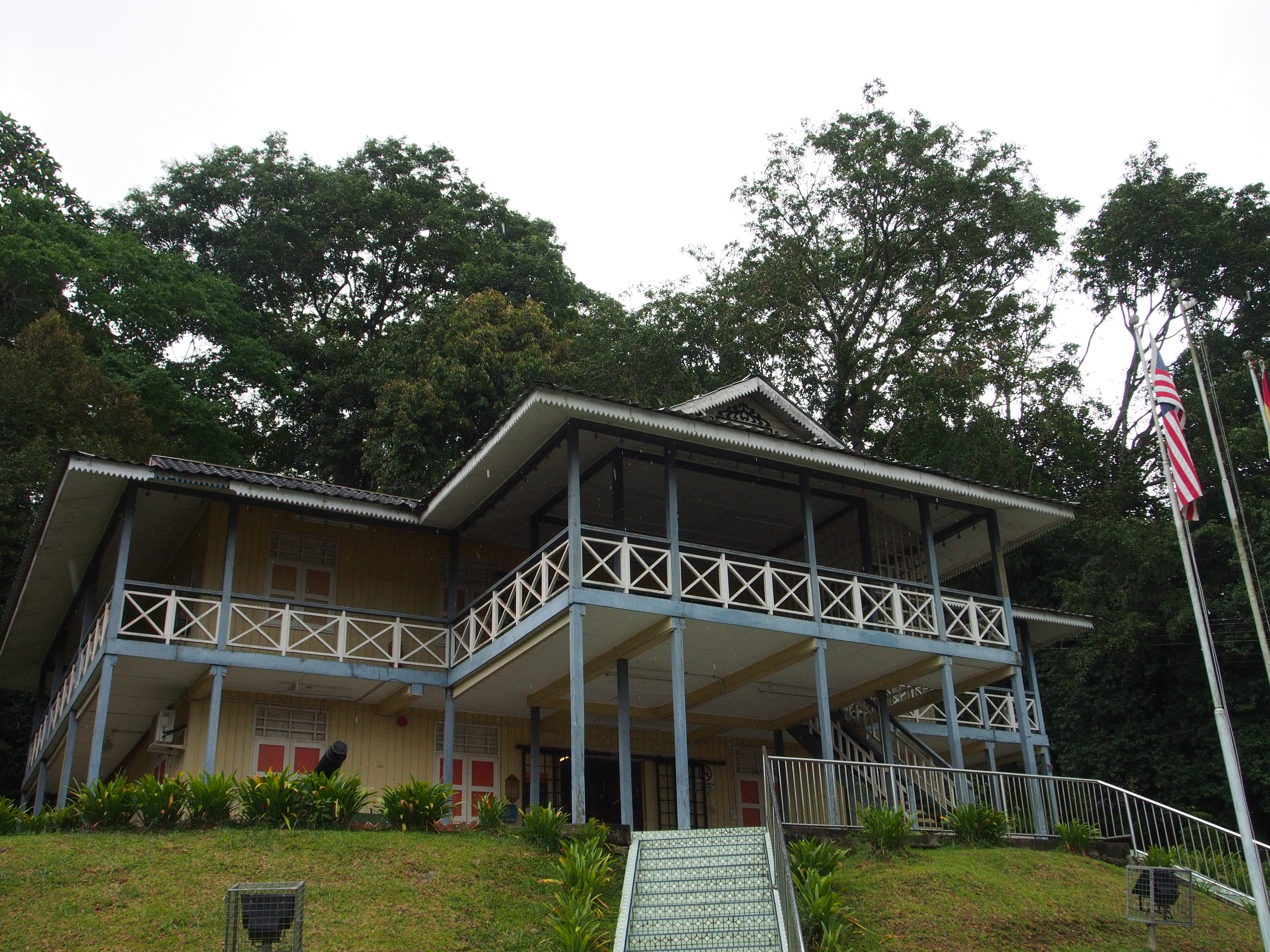 Limbang Regional Museum